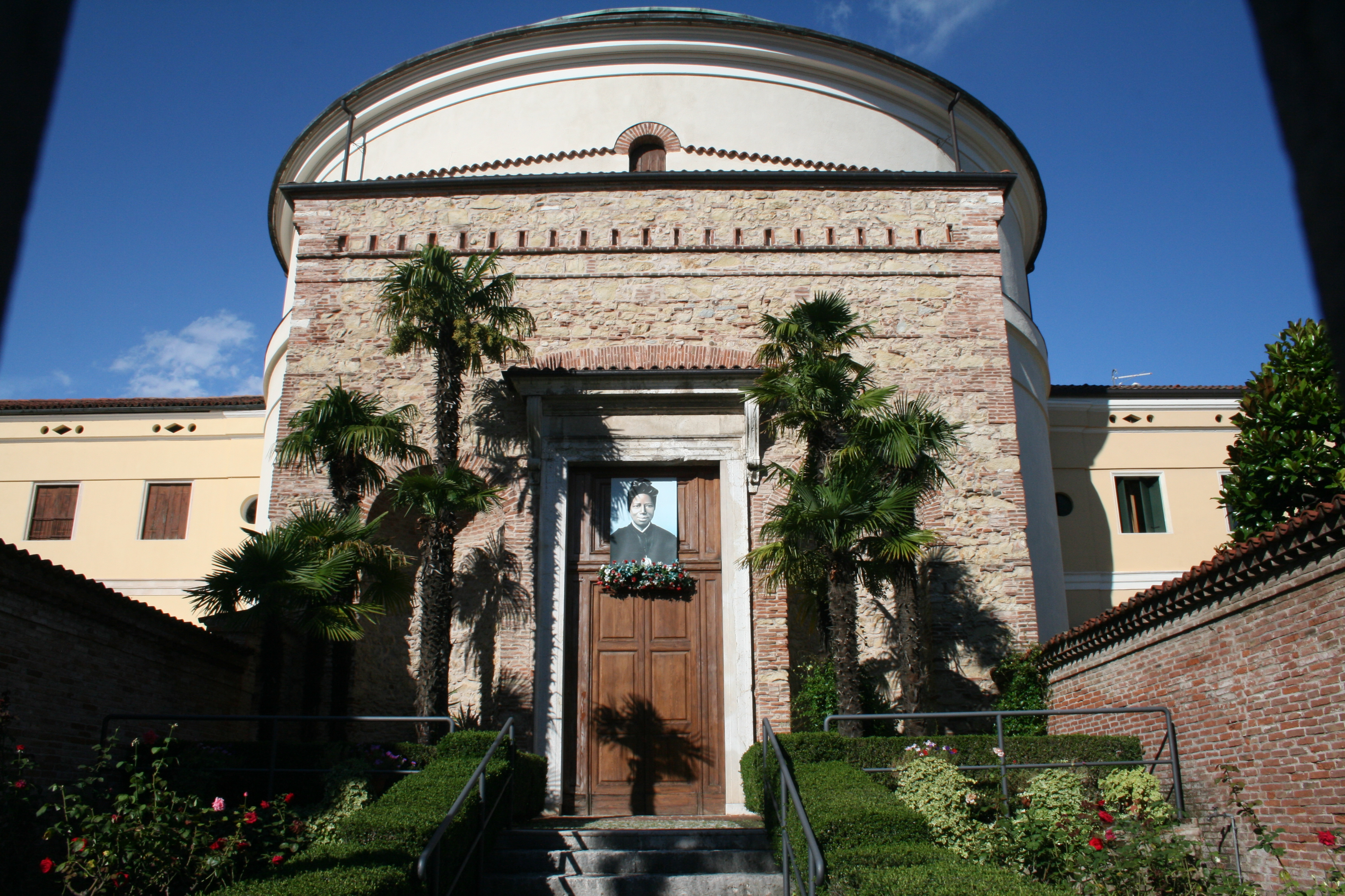 Chiesa della Sacra Famiglia a Schio 1